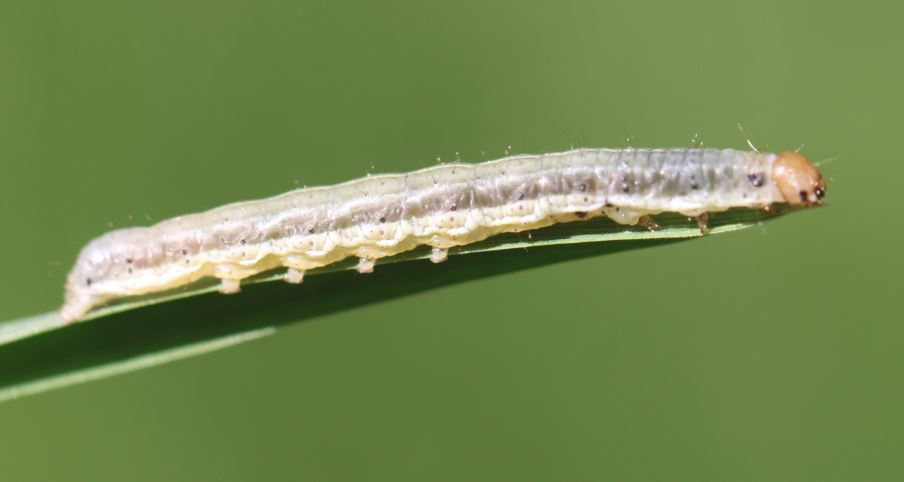 Raupe der Bräunlichgelben Grasbüscheleule (Apamea scolopacina) am 17. Mai 2020 in einem Waldgebiet nahe Stuttgart